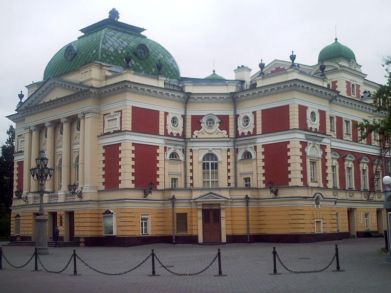 Общий вид театра имени Охлопкова в Иркутске